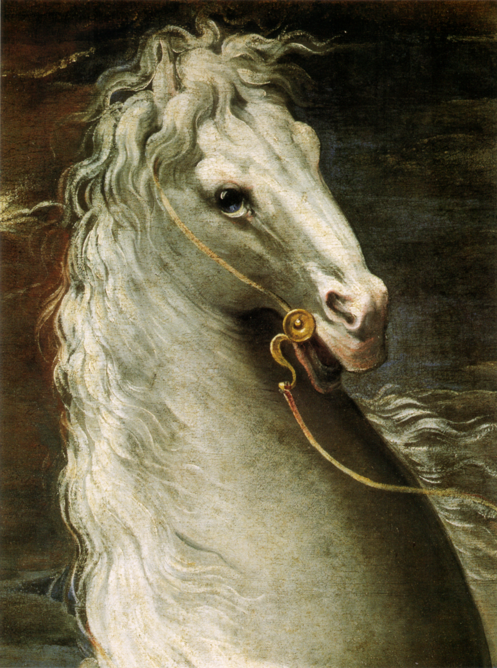 detail